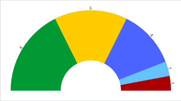 7. Vlada Federacije Bosne i Hercegovine: Stranka demokratske akcije (6) Stranka za Bosnu i Hercegovinu (5) Hrvatska demokratska zajednica (4) Hrvatska demokratska zajednica 1990 (1) Savez nezavisnih socijaldemokrata (1)